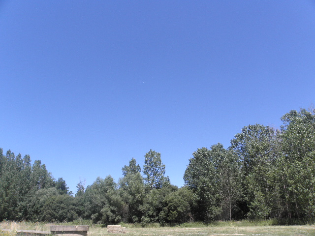 Paisaje con chopos en Revilla de Cepeda